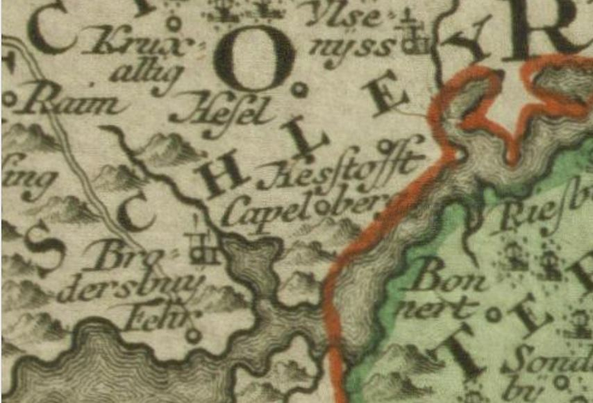 Historischer Kartenauszug des Bereichs entlang der Schlei (Schley) von Brodersby bis Hestoft, mittig gelegen Capelberg (Goltoft); südlich der Schlei ist Schwansen zu sehen